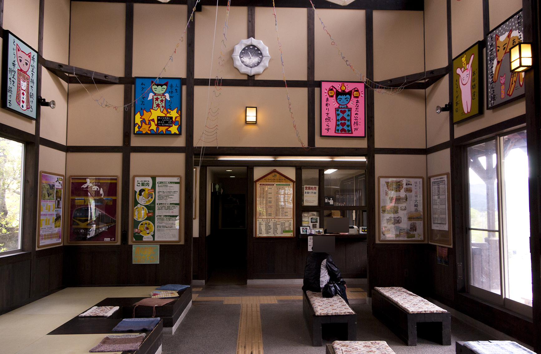 東日本旅客鉄道株式会社陸羽東線鳴子御殿湯駅